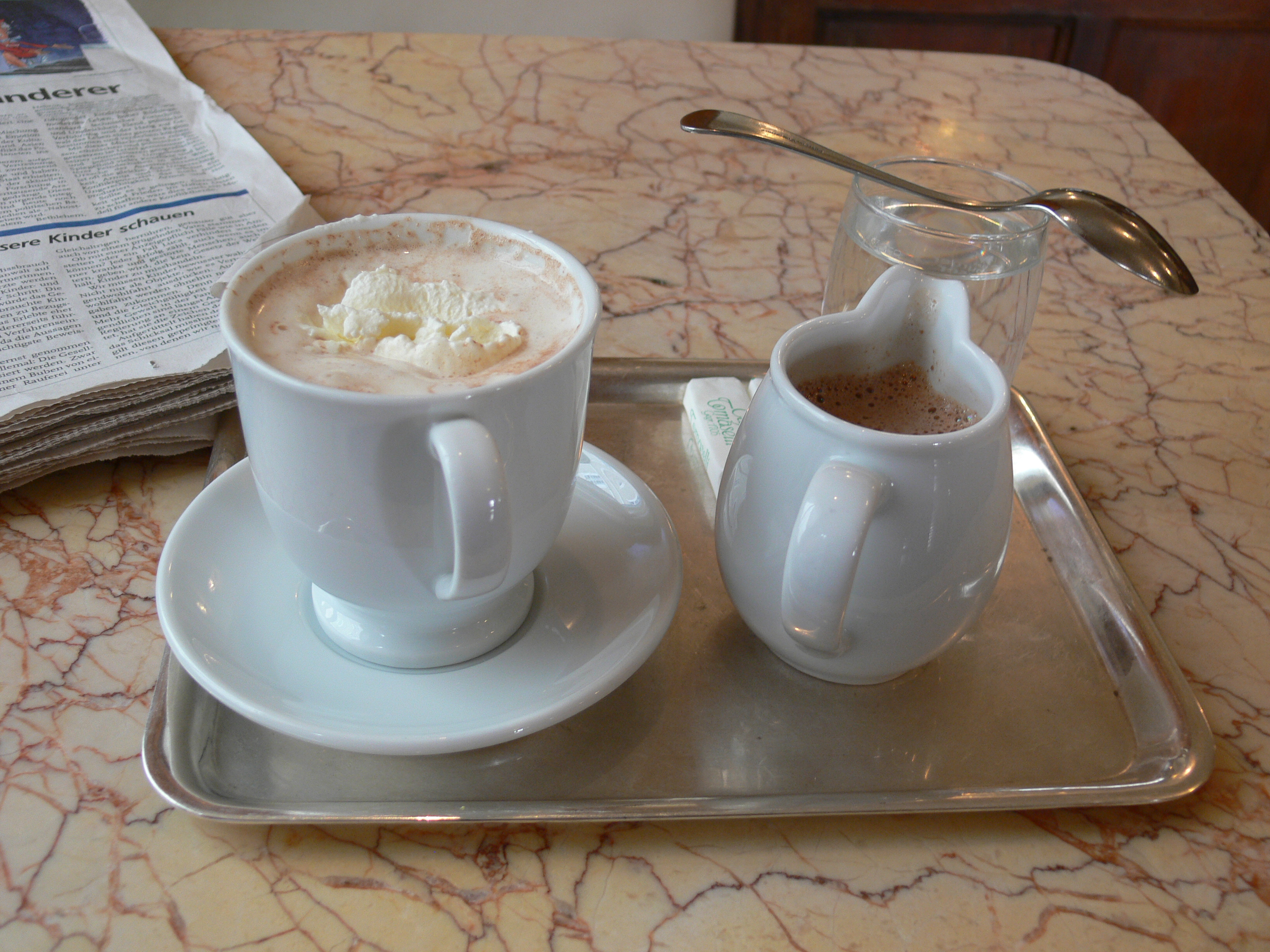 Portion Schokolade im Café Tomaselli, Salzburg